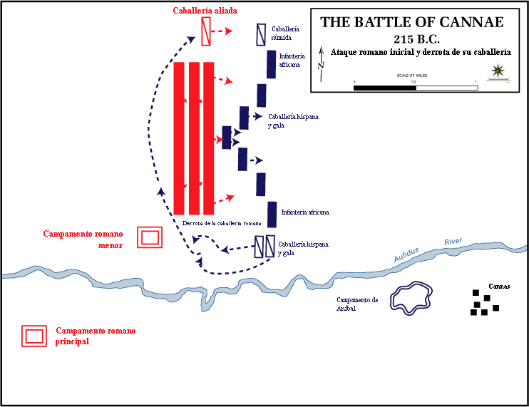 Battle of Cannae; Batalla de Cannas